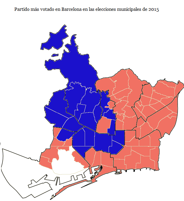 Partido más por barrios de Barcelona en las elecciones municipales de 2015. El color rosado es Barcelona en Común, el color azul oscuro es CiU.